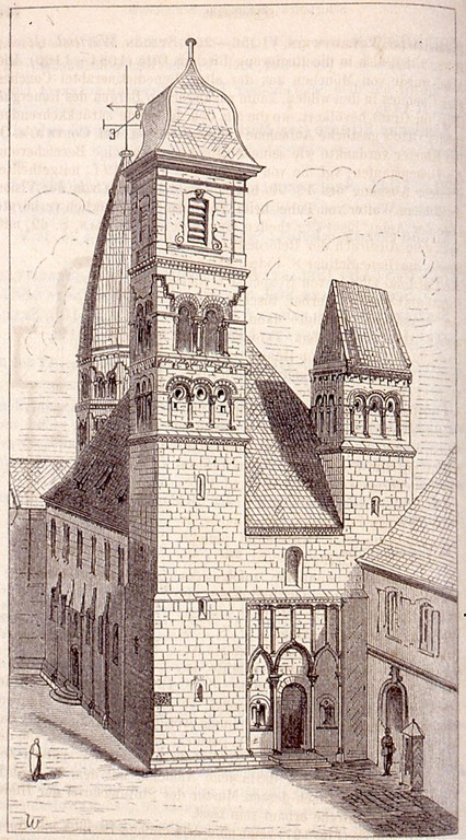 L'église Sainte-Foy de Sélestat au XIXe. Edité par C.F. Schmidts Universitaet (Strasbourg) en 1876. Auteur inconnu.